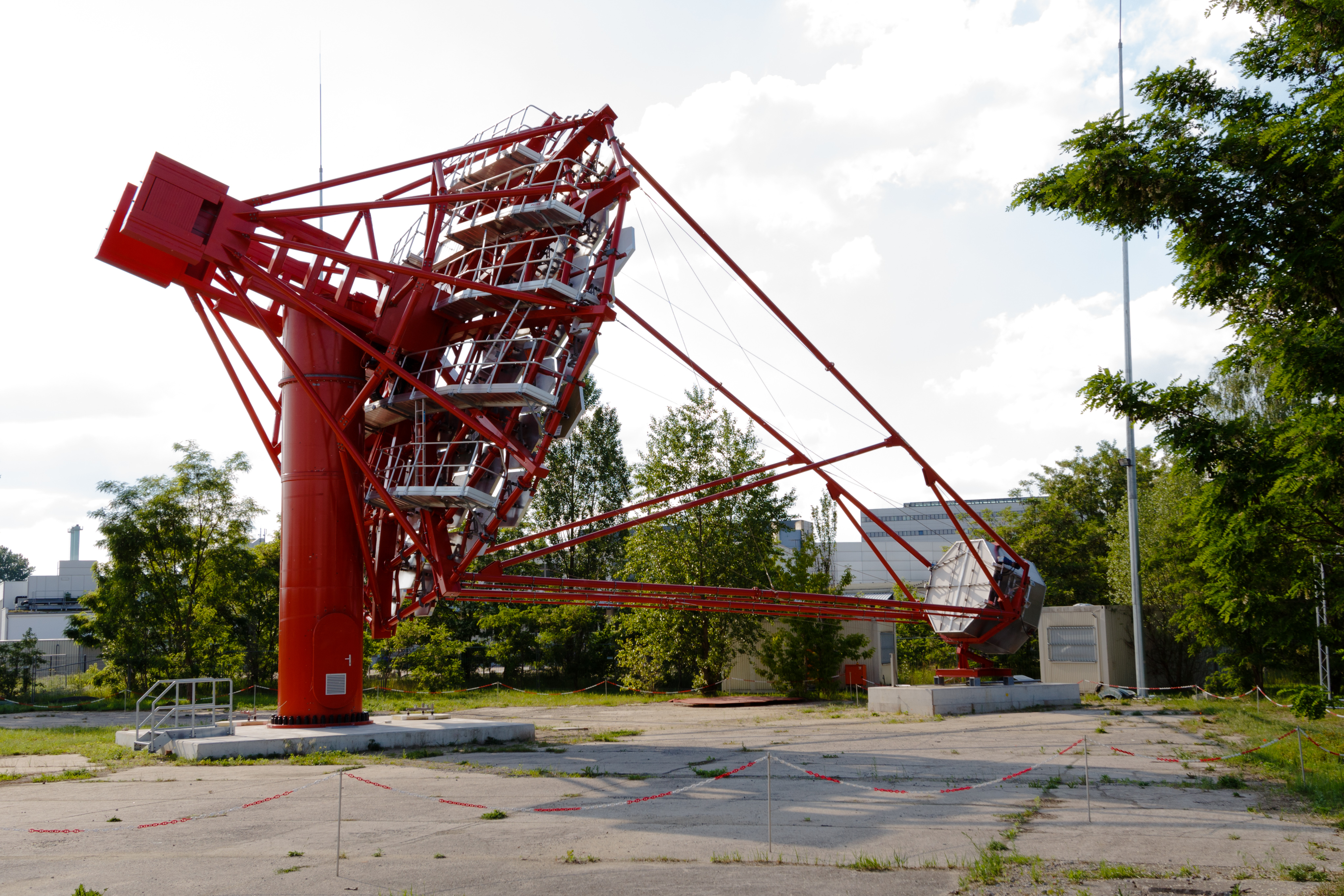 Cherenkov Telescope Array in Berlin-Adlershof